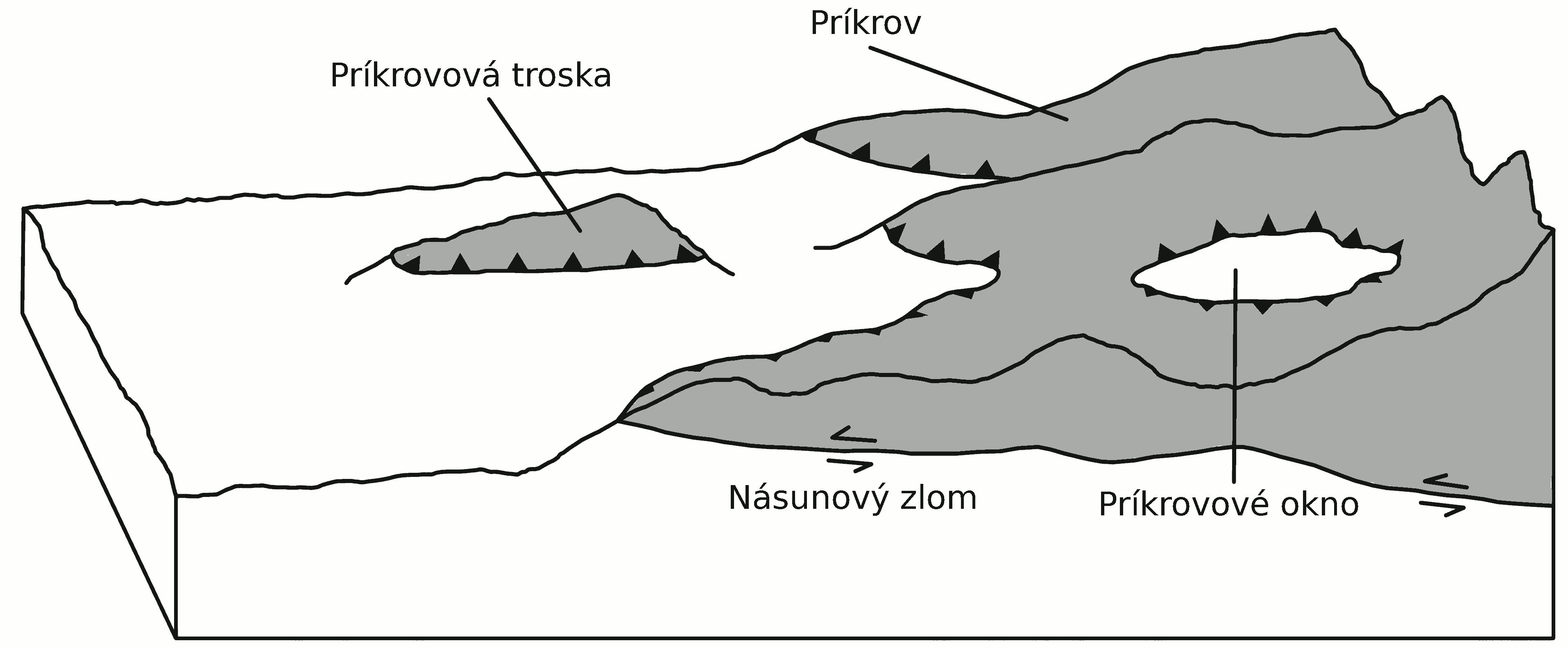 Popísky ve Slovenčině